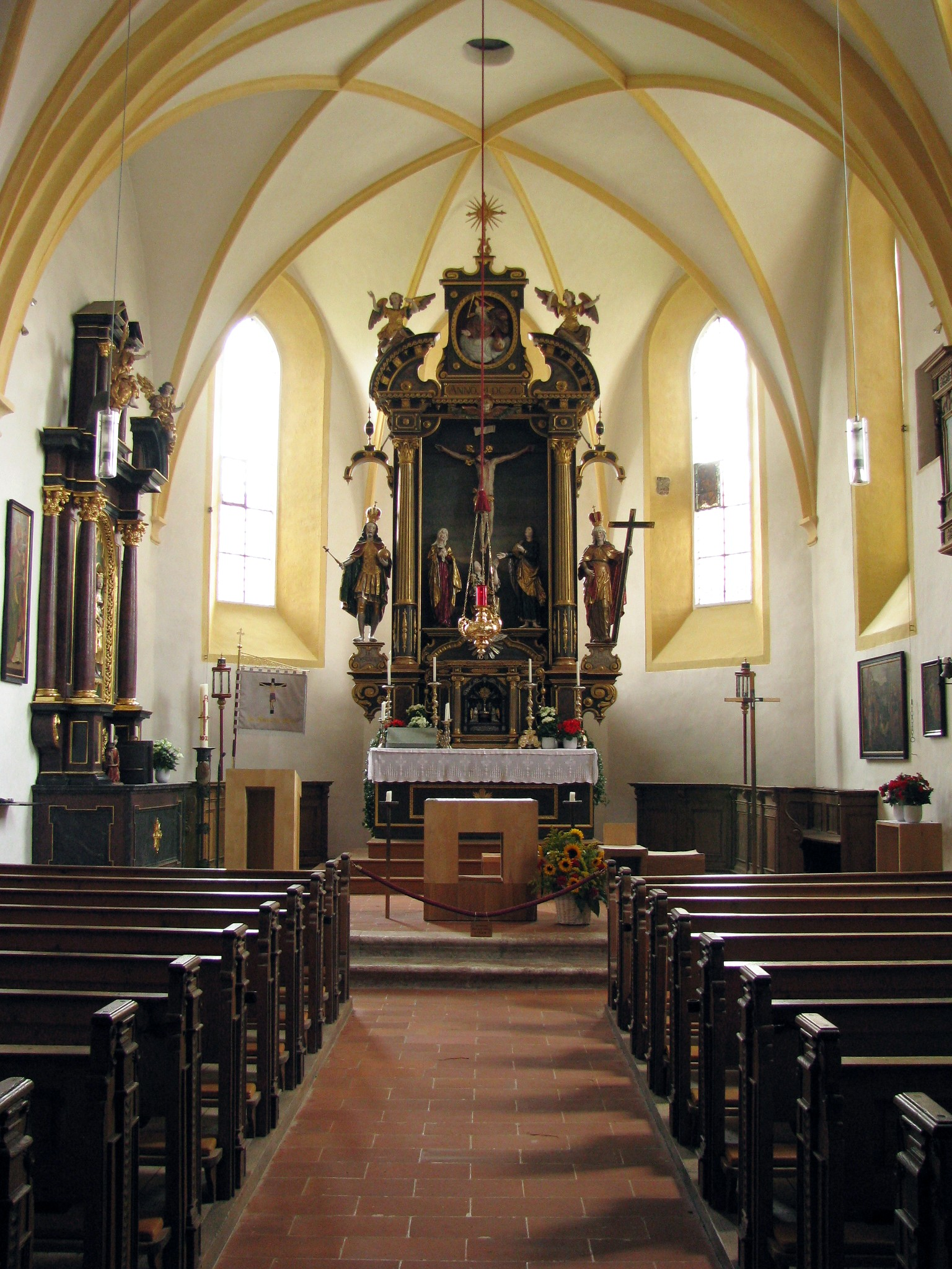 Heilig-Kreuz-Kirche in Schaftlach